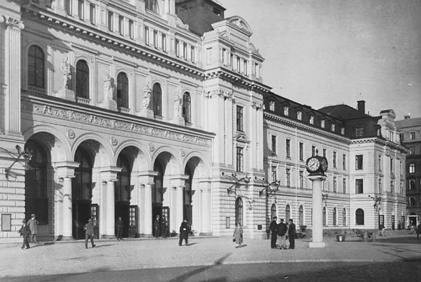 Centralplan med ny klocka på kolonn